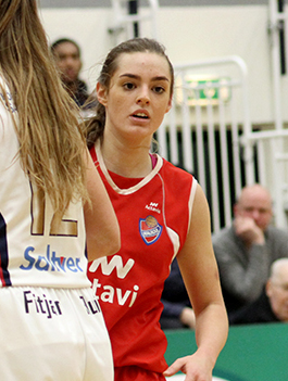 Úrvalsdeild kvenna game between Haukar and Keflavík on 14 January 2015.